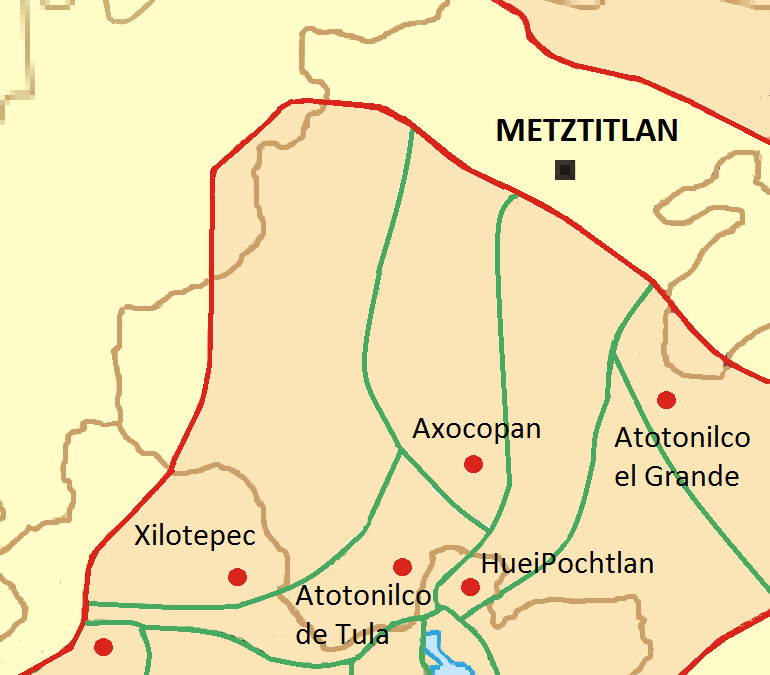 Ampliación de imagen subida en Commons con licencia para remezclar. Aparece la extensión de las Provincias norteñas de la Excan Tlahtoloyan, que cubren en parte el Estado de Hidalgo.